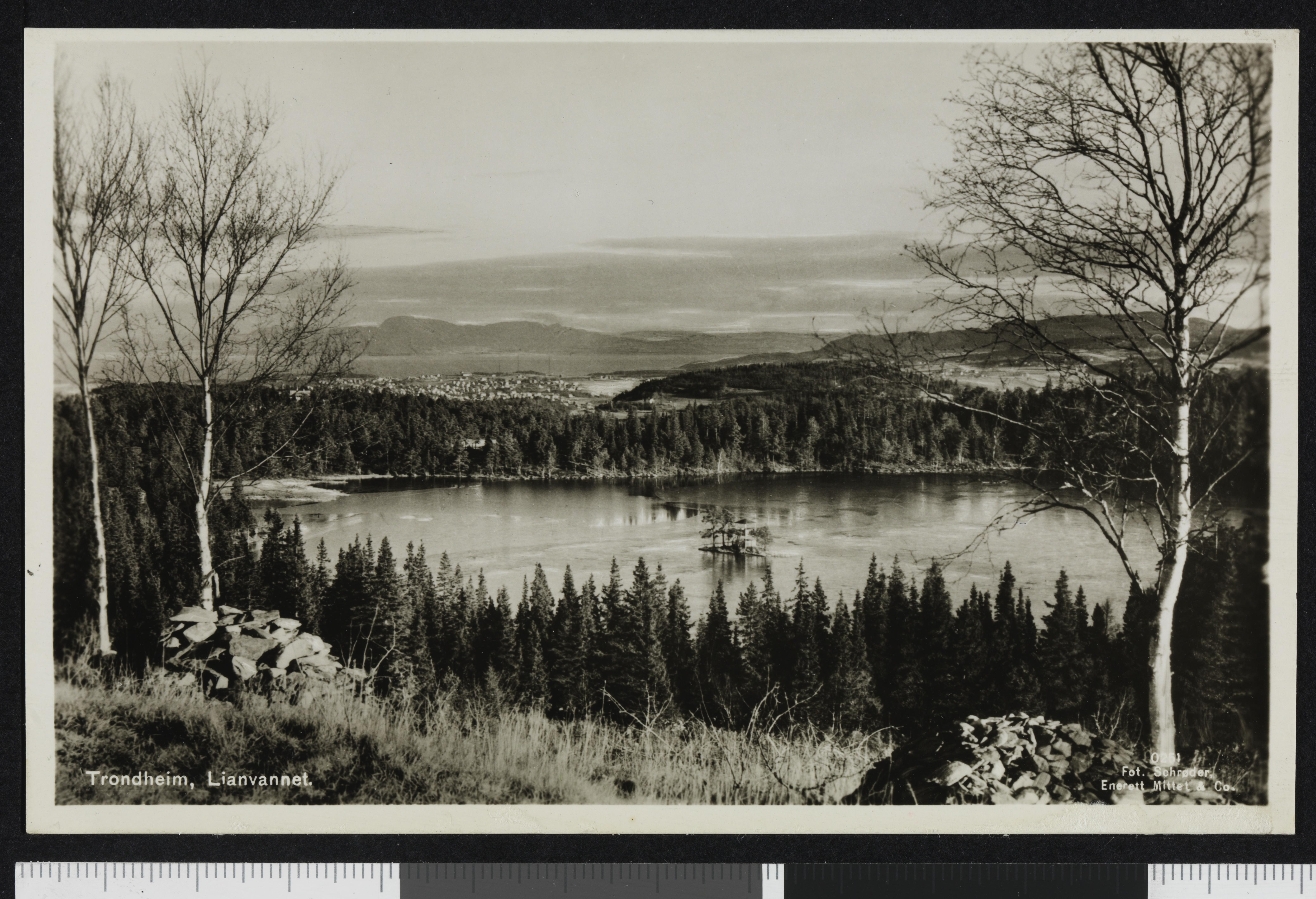 Bildet er hentet fra Nasjonalbibliotekets bildesamling Lian, Trondheim, Sør Trøndelag